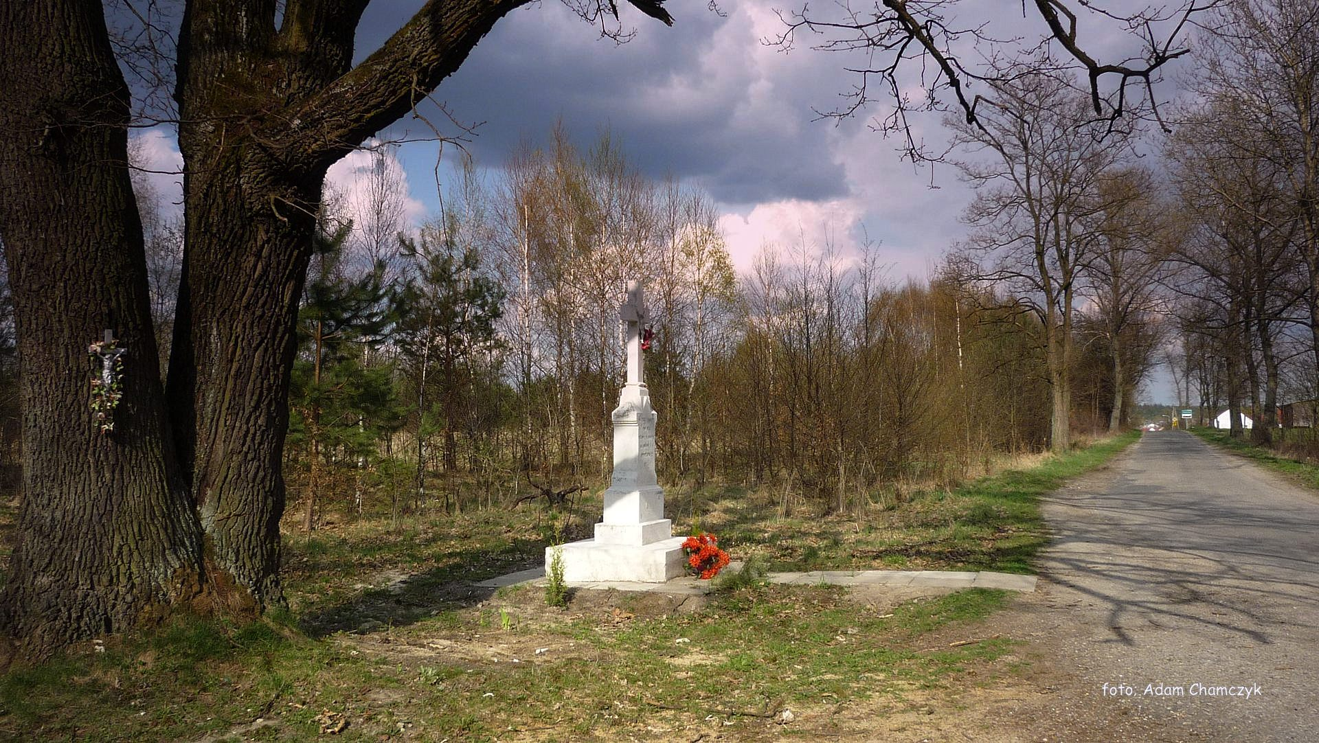 Smarków